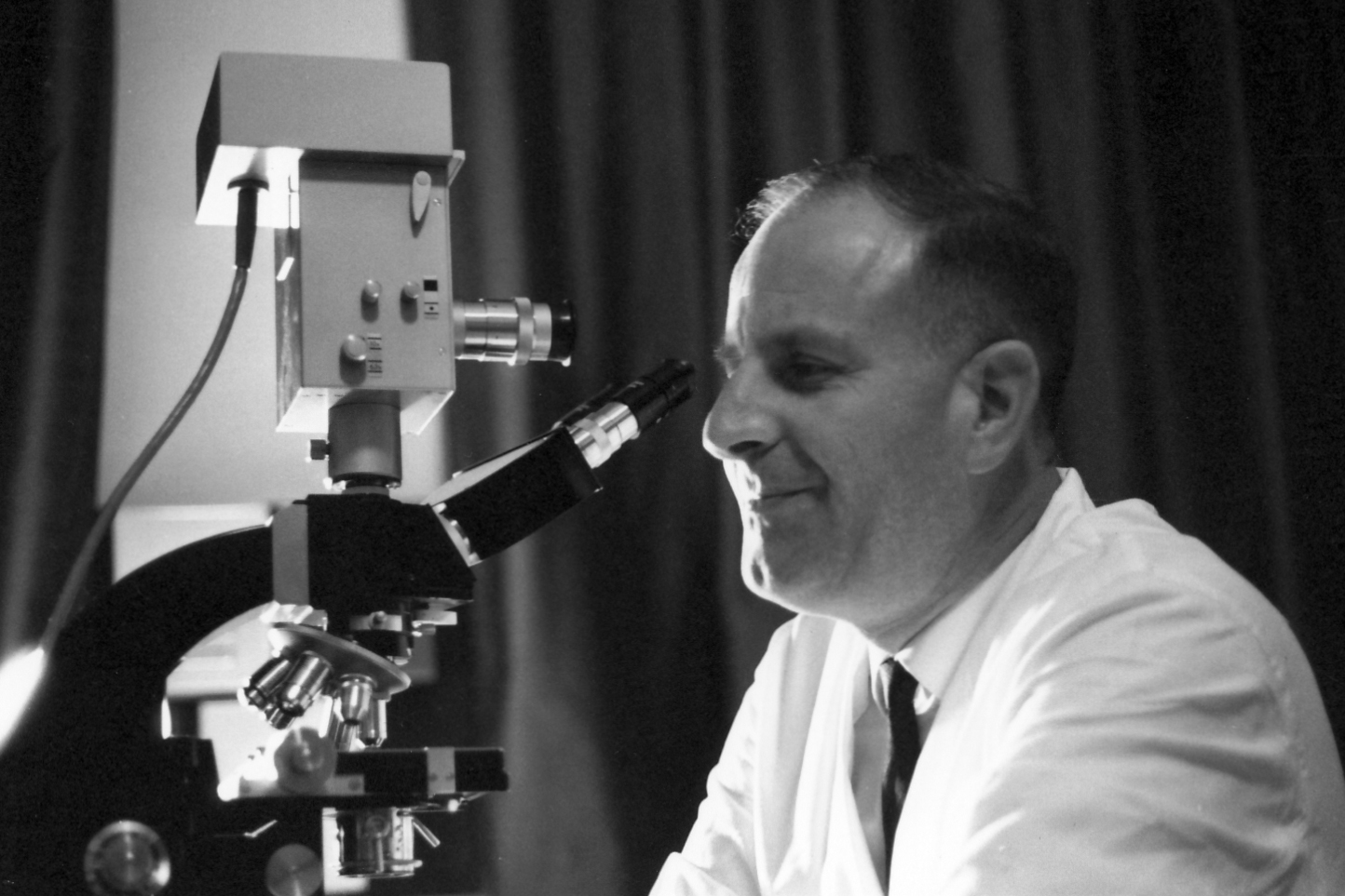 Thurner Josef, Prof. Dr. med. univ.